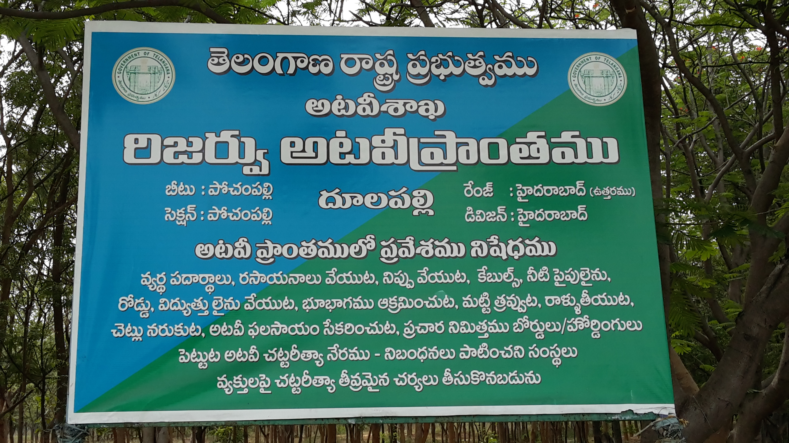 Display board about Doolapalli reserve forest at the AP forest academy, Hyderabad.